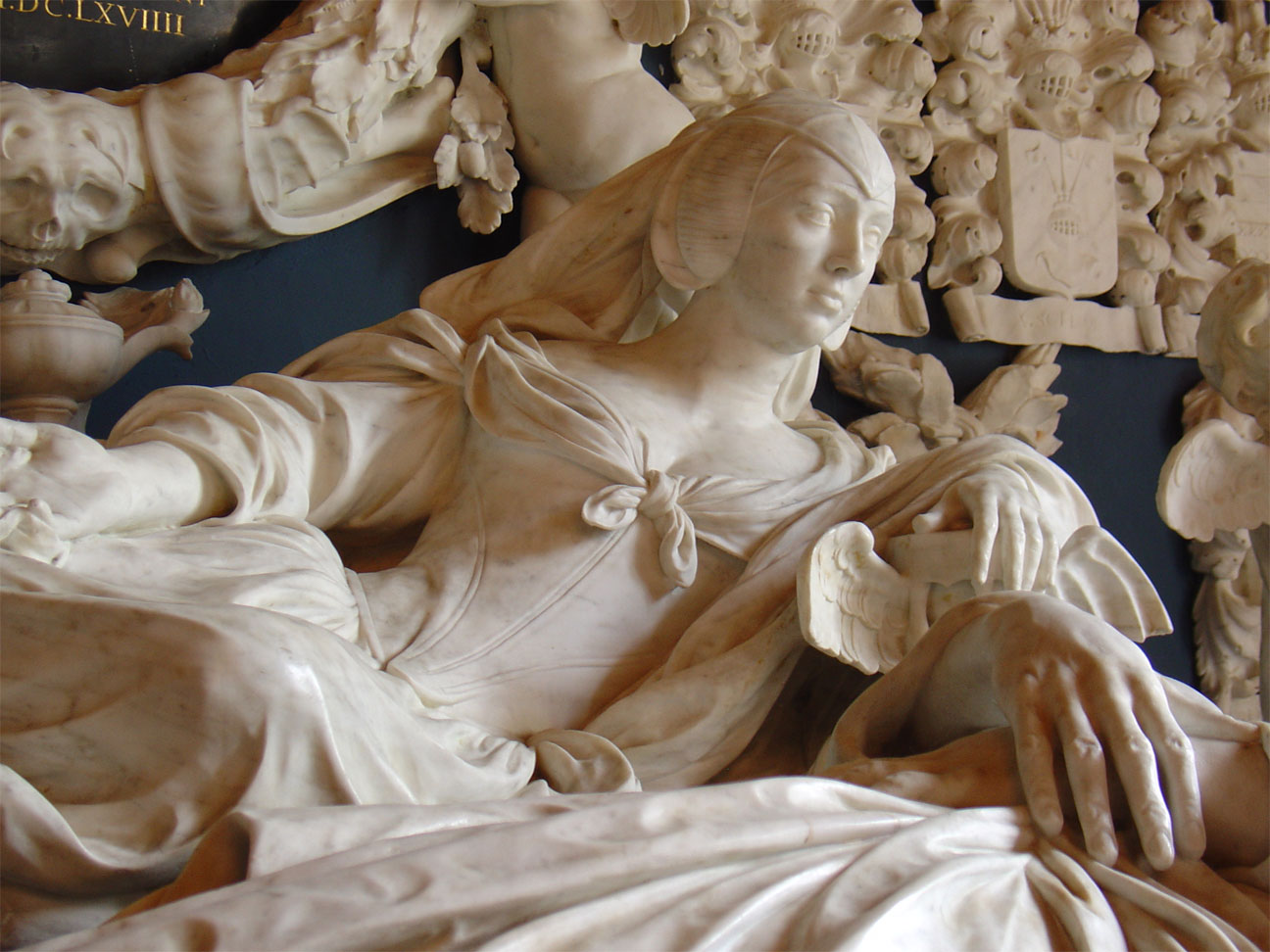 Praalgraf in de kerk van Midwolde (detail van het werk van Rombout Verhulst)